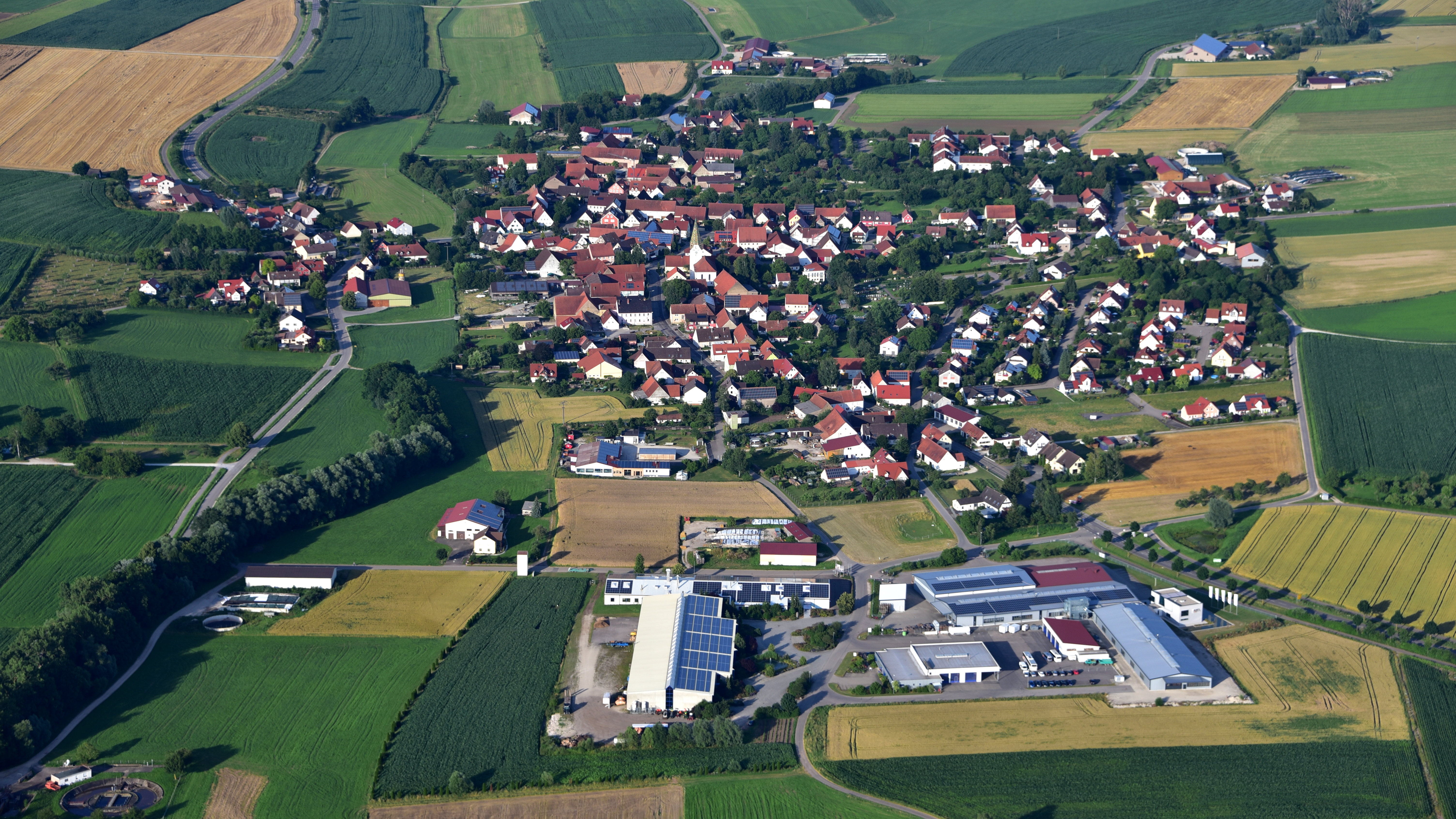 Westheim (Mittelfranken), Luftaufnahme (2016)